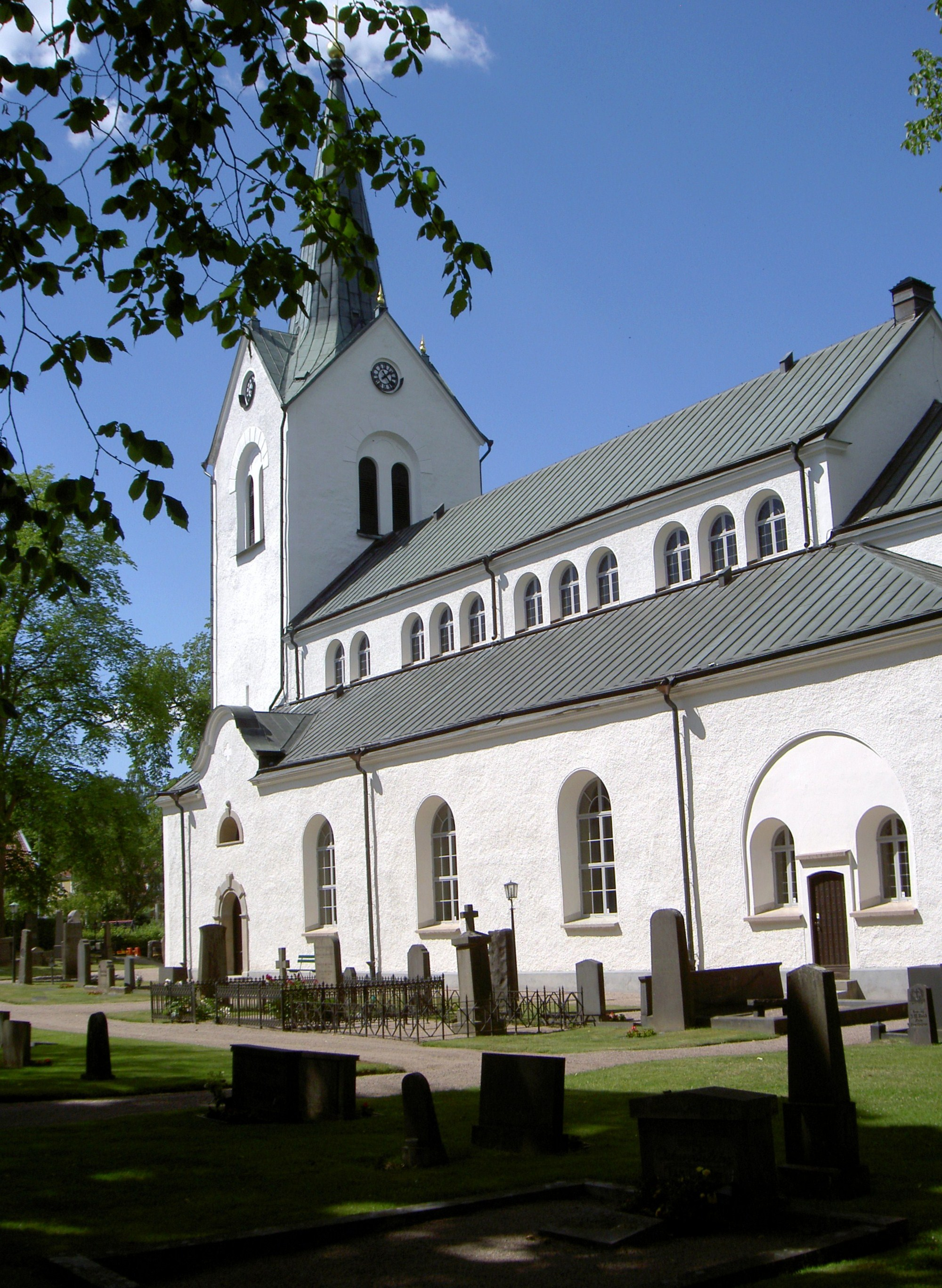 Vetlanda kyrka.